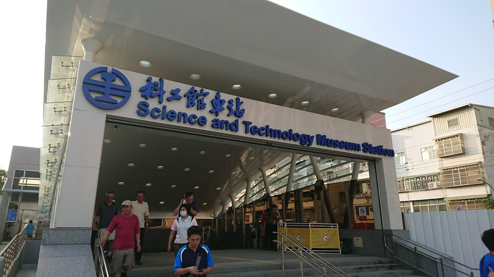 科工館車站出入口(攝於2018.10.14)